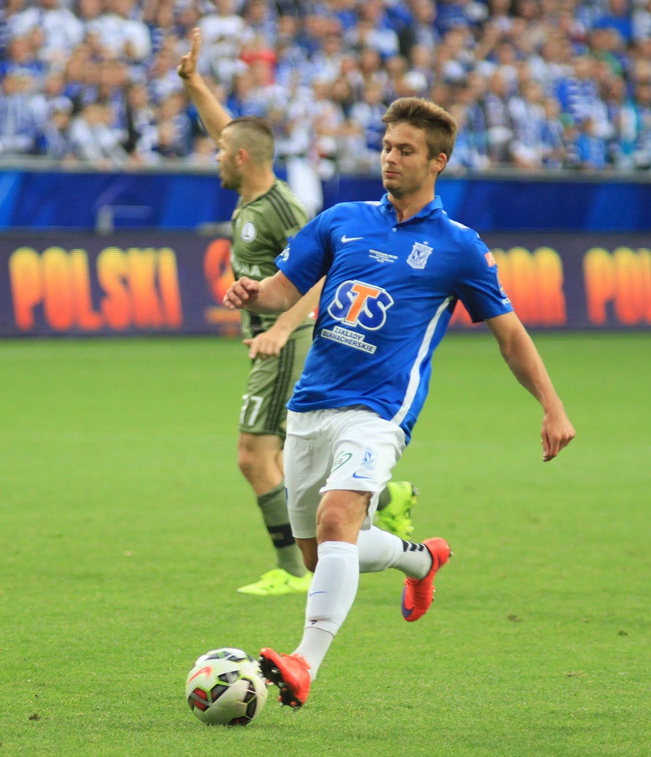 Mecz o Superpuchar Polski w piłce nożnej: Lech Poznań - Legia Warszawa (3:1), INEA Stadion, Poznań